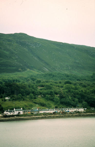 Applecross in Schottland